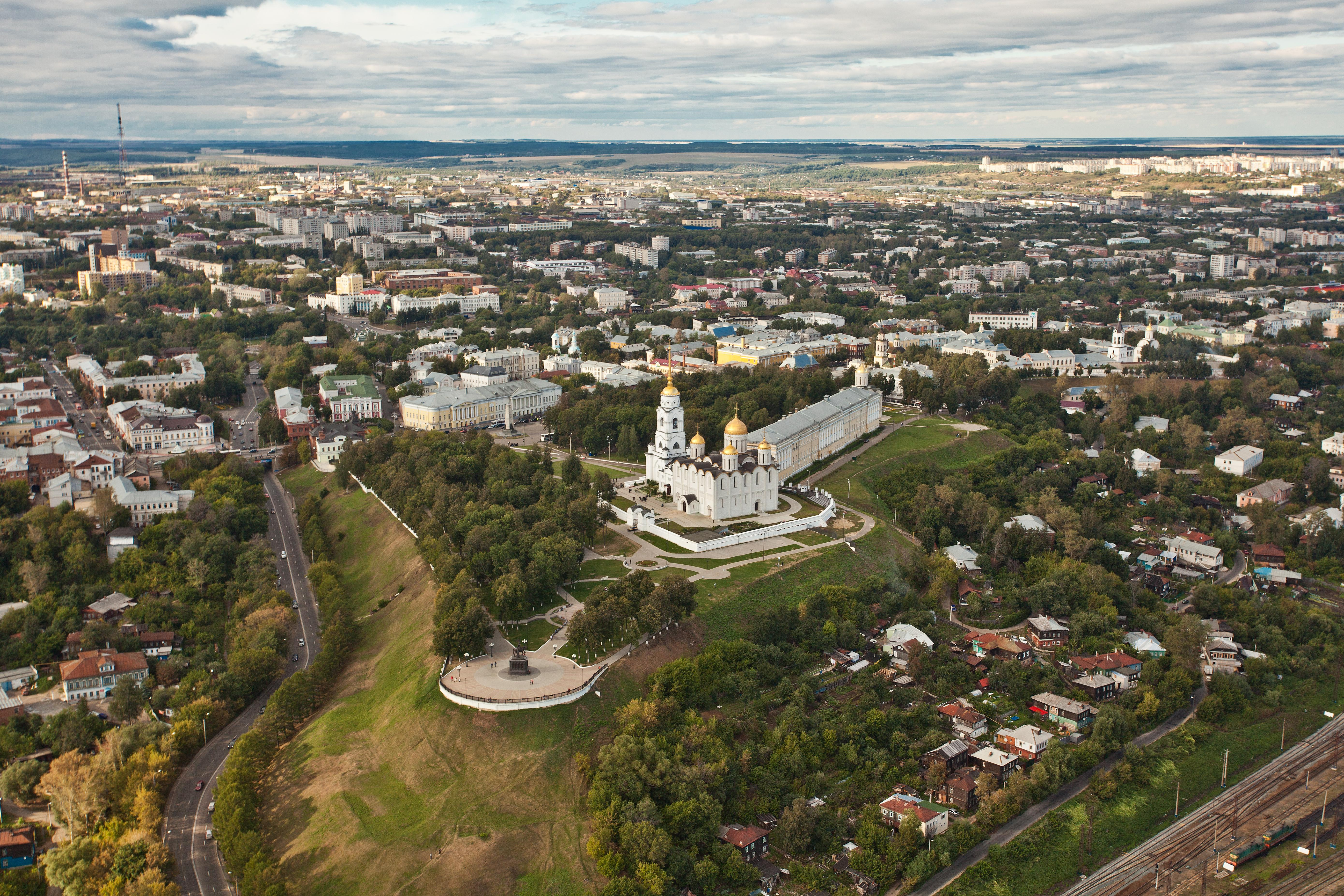 город Владимир, вид на Успенский собор